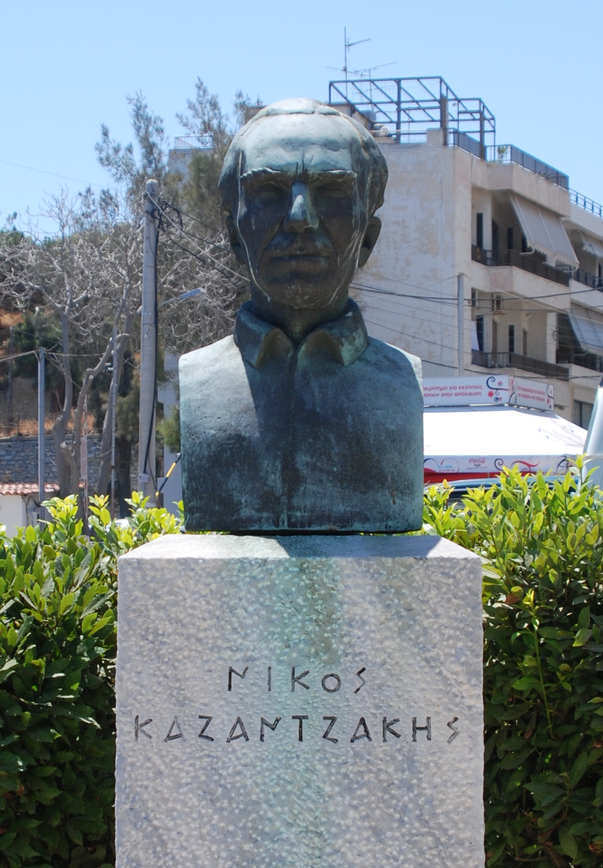 Nikos Kazantzakis Statue in Heraklion